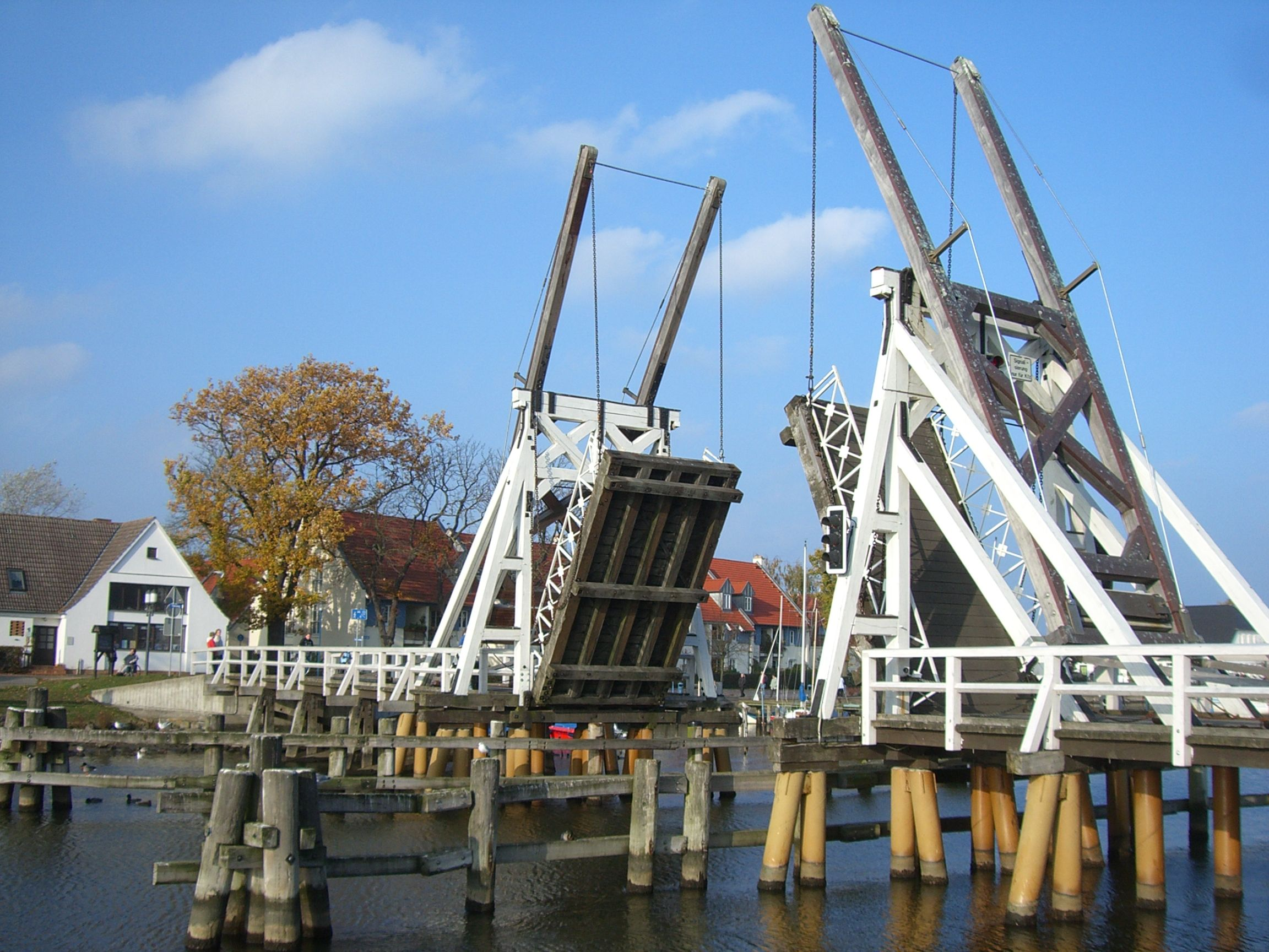 Brücke in Greifswald-Wieck